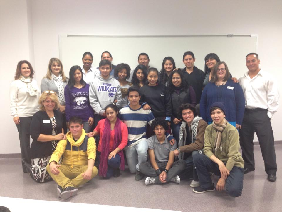 Los primeros estudiantes de la UNAE en Kansas